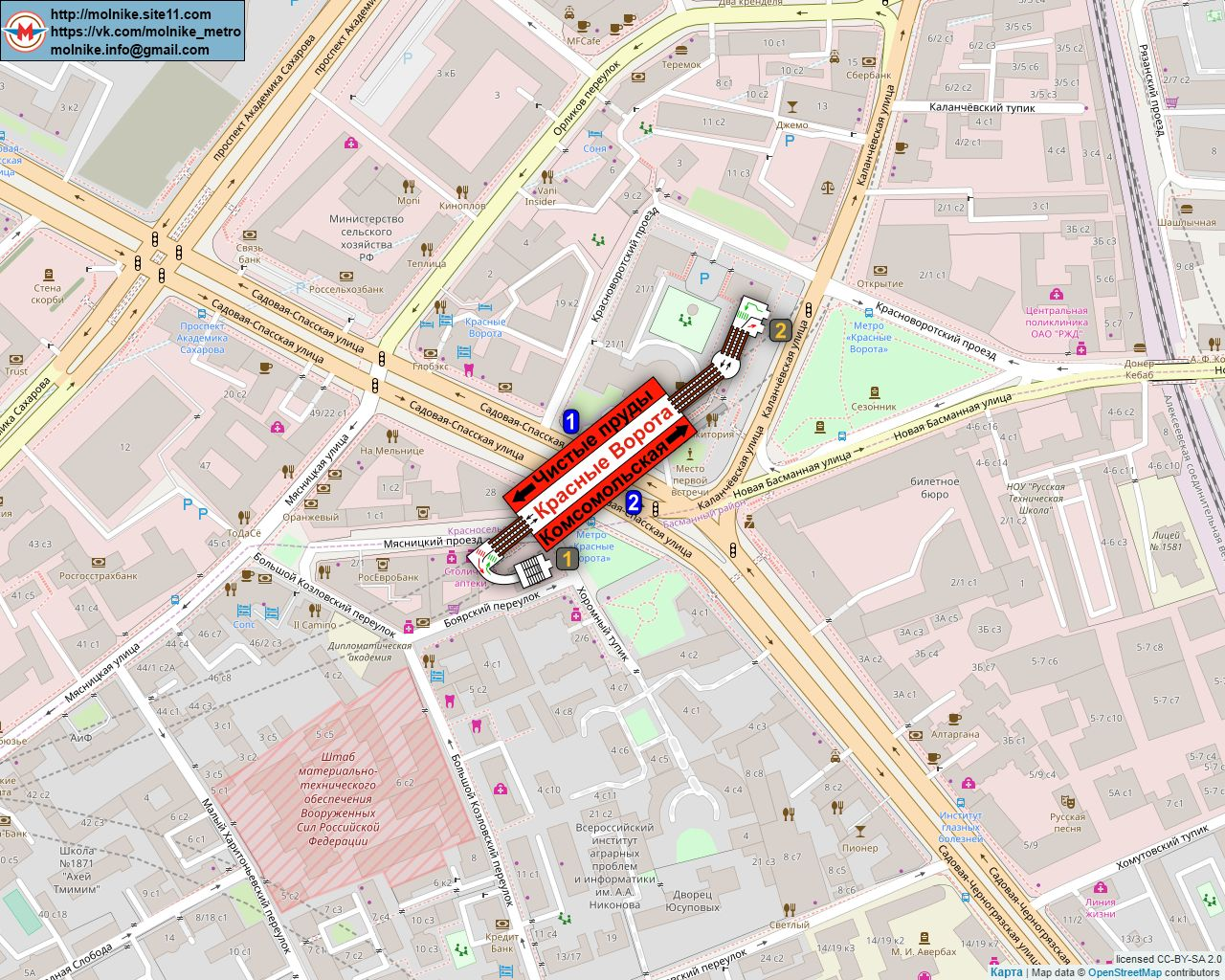 Схема станции метро «Красные Ворота» на карте Москвы